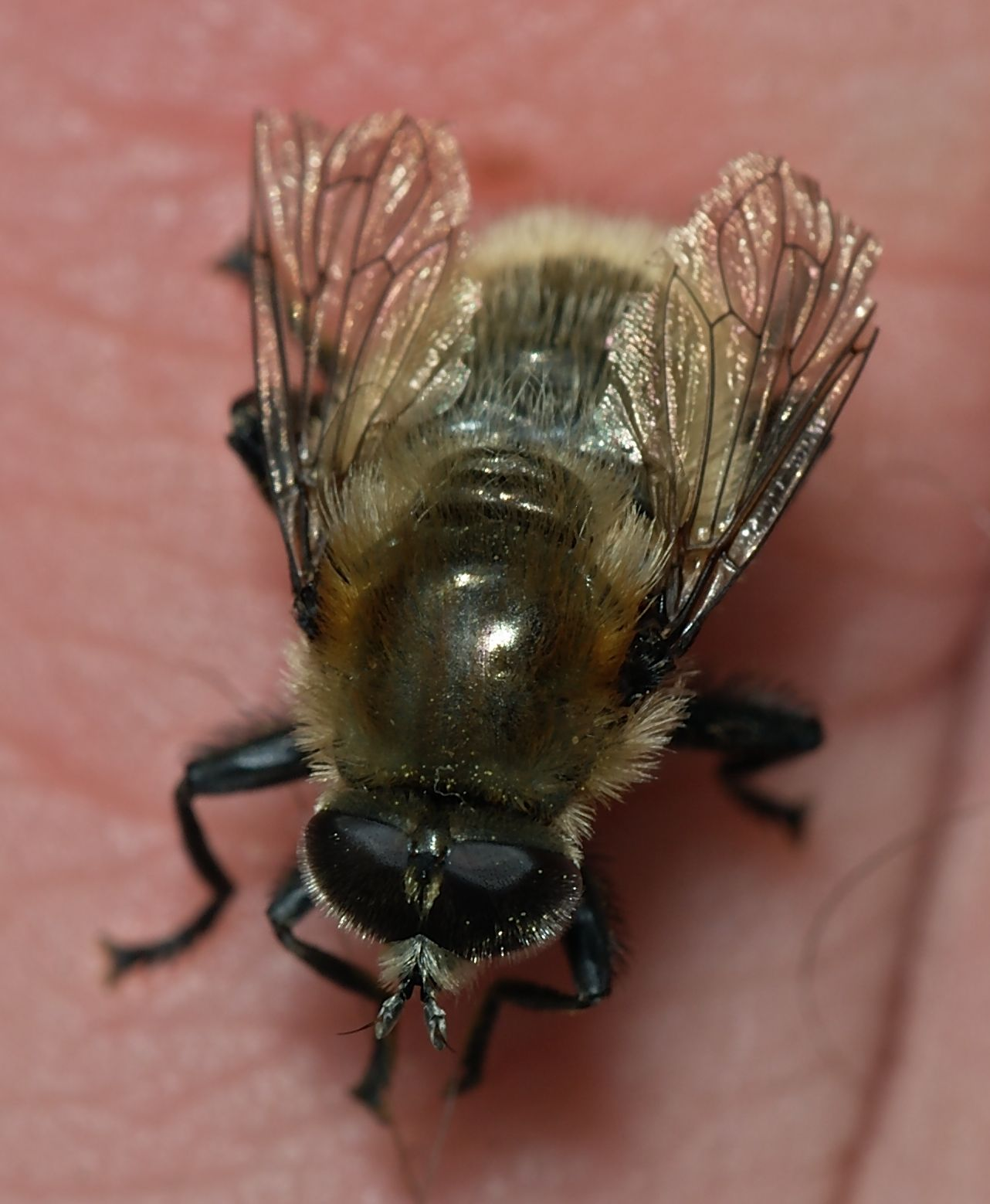 Merodon equestris (det. Paul Beuk) from Cologne, Germany.